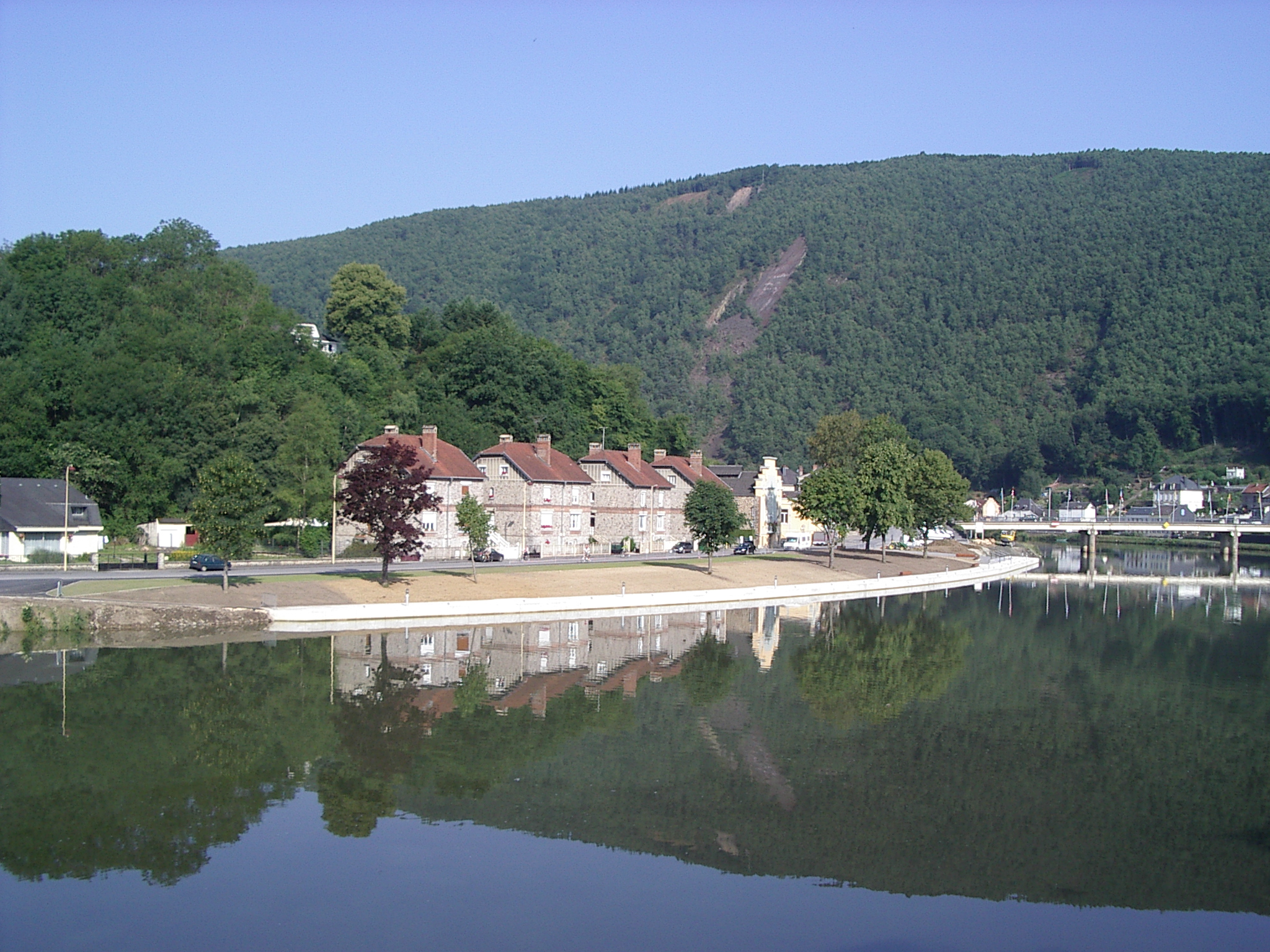 Nouvelle Halte Fluviale (en cours d'achèvement), Monthermé, departement des Ardennes